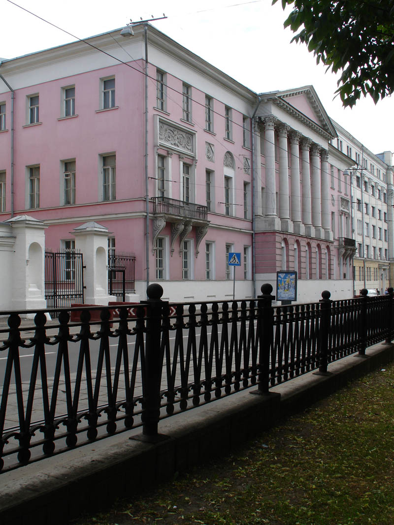 Moscow, Pokrovsky Boulevard 11 - Durasov House RUSSIAN: Москва. Дом Дурасова на Покровском бульваре